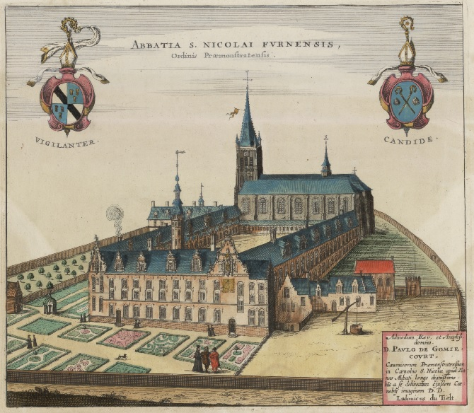 De Sint-Niklaas abdij van Veurne in de eerste helft van de 17e eeuw (afbeelding uit Flandria Illustrata - 1641)